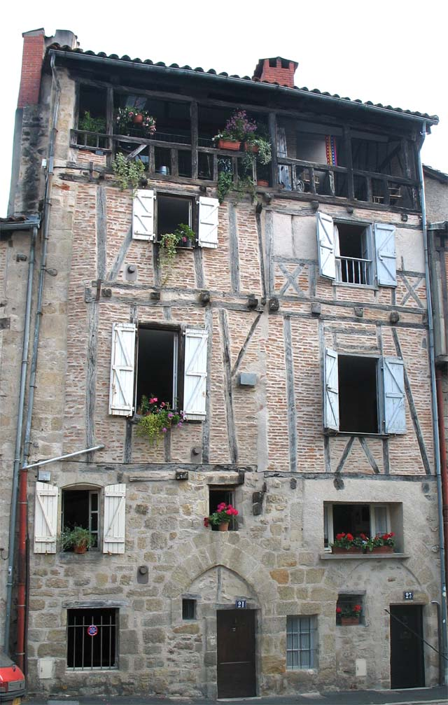 Maison Caumont